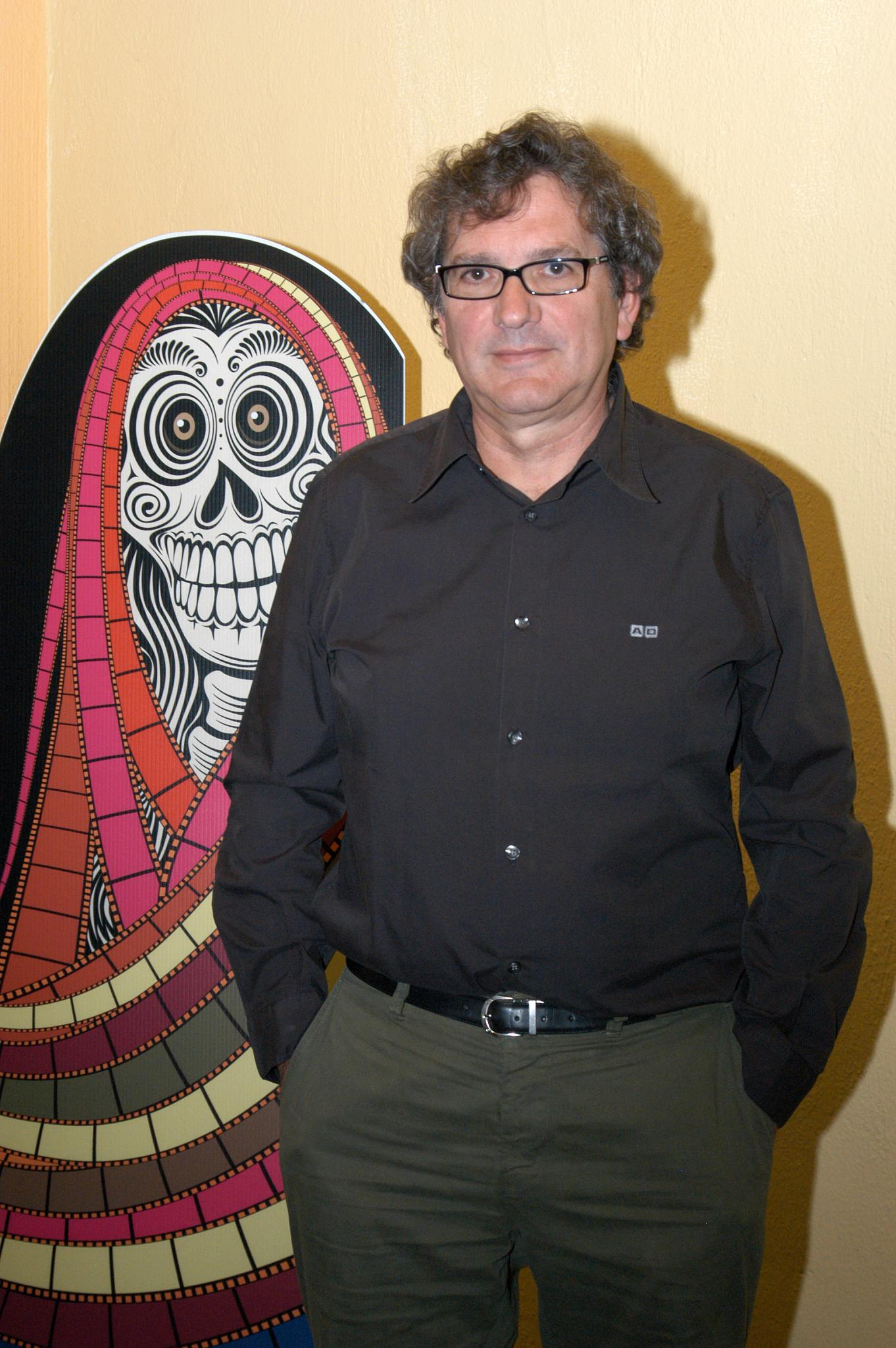 Guadalajara, Jalisco, 7 de marzo de 2008. Gerardo Herrero ponente del 6° Encuentro Iberoamericano de Coproducción Cinematrográfica.